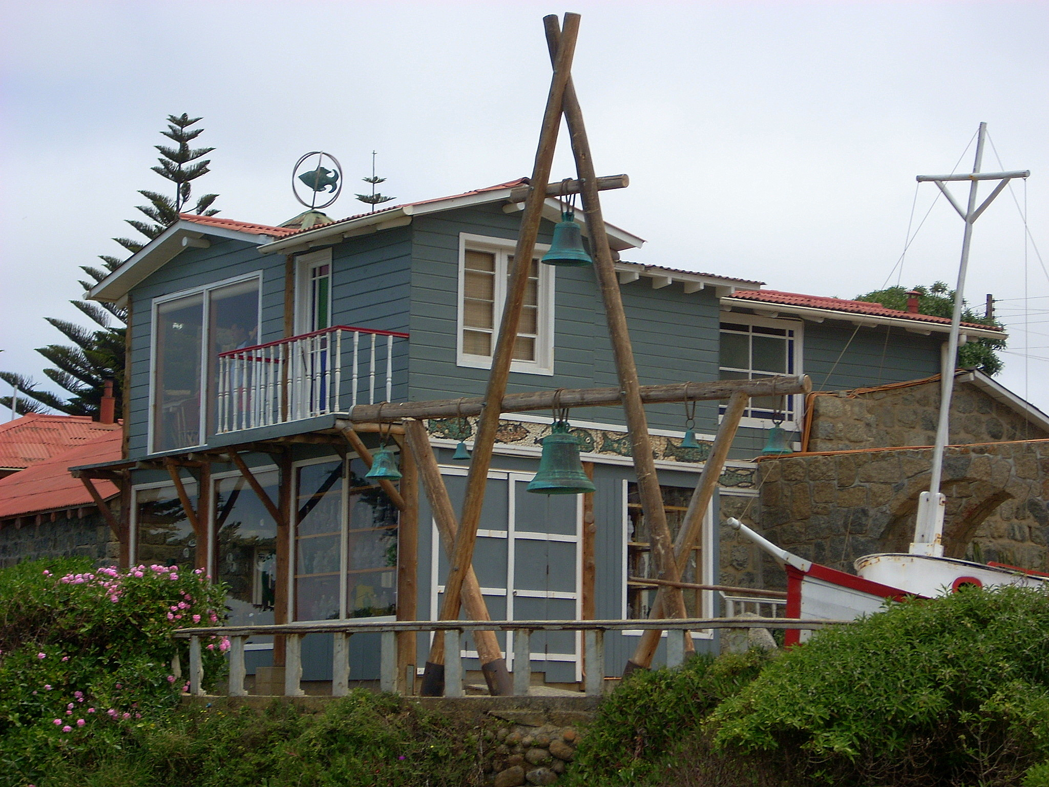 Casa de Pablo Neruda en Isla Negra This is a photo of a national monument in Chile: 783